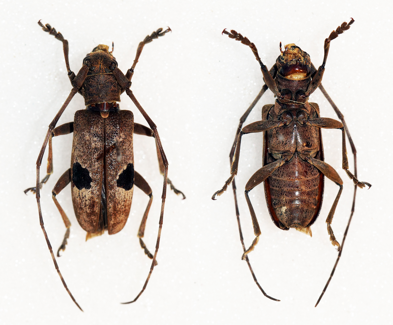 Gahan,1888 Sex: Female Data: 05-2015 - Sapa mt - Lao cai prov - Vietnam Size: 15mm